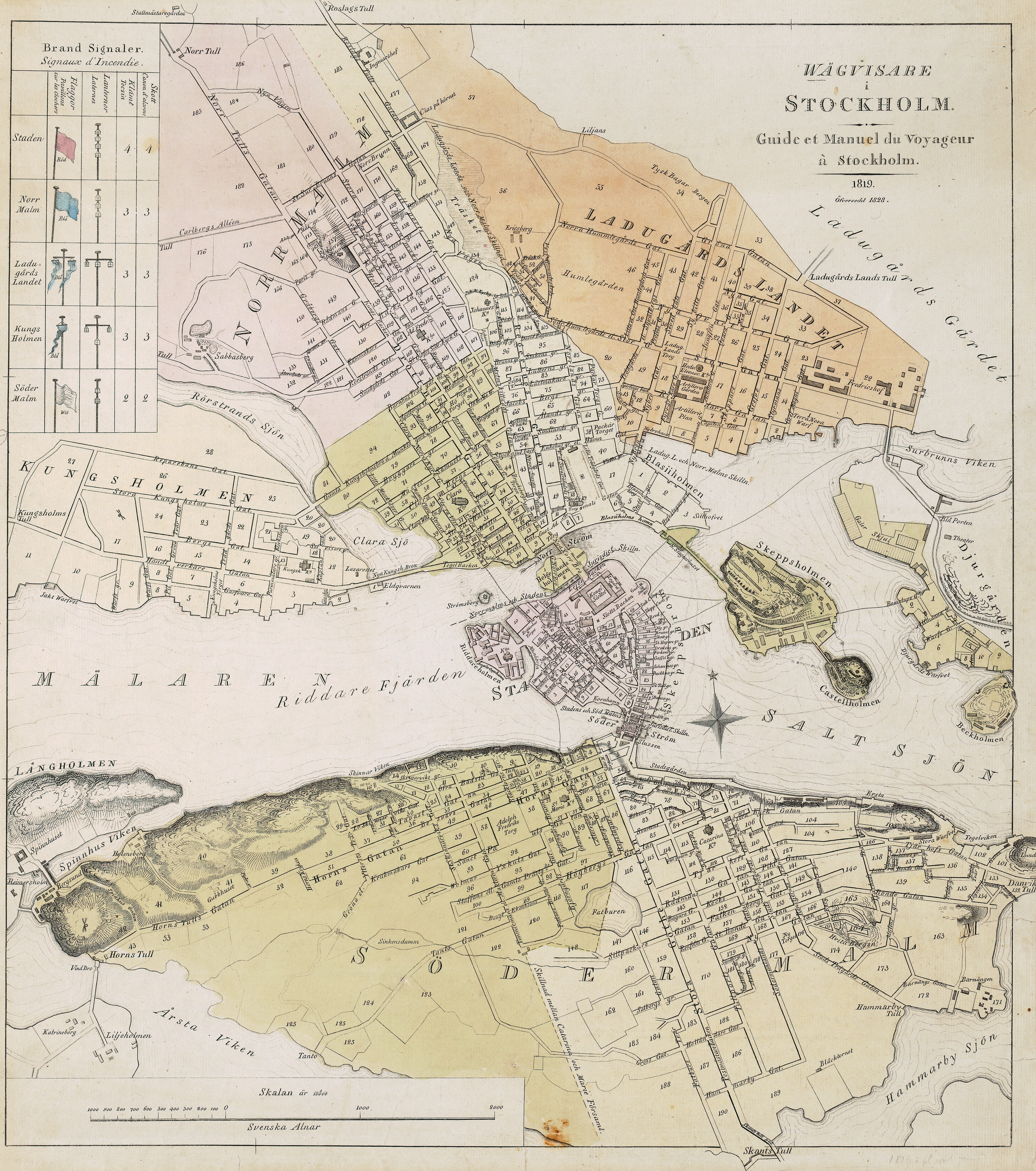 Karta över Stockholm innanför tullarna från 1819, översedd 1828. Stadsdelarnas namn är utskrivna och församlingarna är markerade med olika färger. I kartans vänstra hörn är stadens brandsignaler beskrivna. Vid händelse av brand varnades staden med hjälp av flaggor, lyktor, klockringning och skott. Wägvisare i Stockholm. Guide et Manuel du Voyageur à Stockholm [Kartguide för resande till Stockholm].